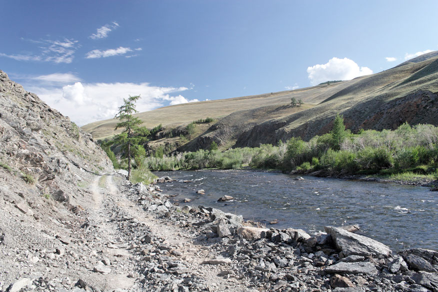 Река Моген-Бурен в Туве